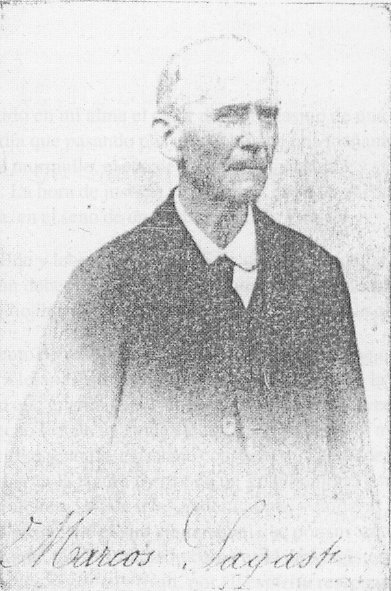 Retrato de Marcos Sagasti